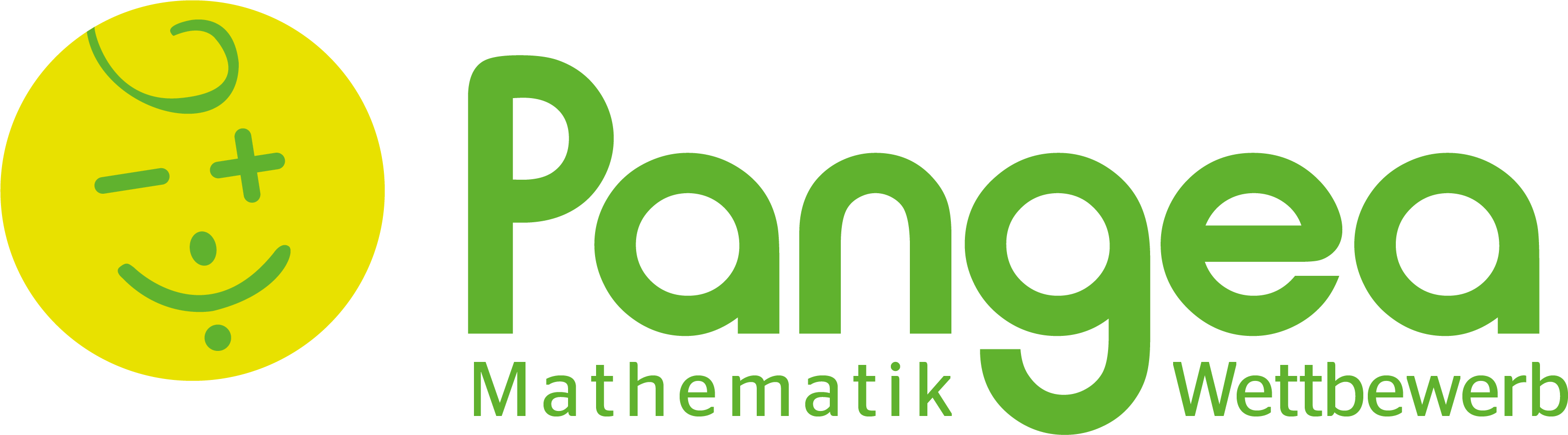 Logo des Pangea Mathematik-Wettbewerbs